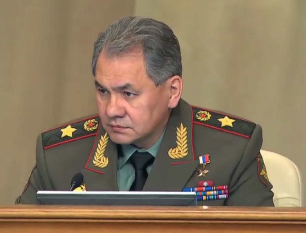 Сергей Шойгу в форме генерала армии образца 2013